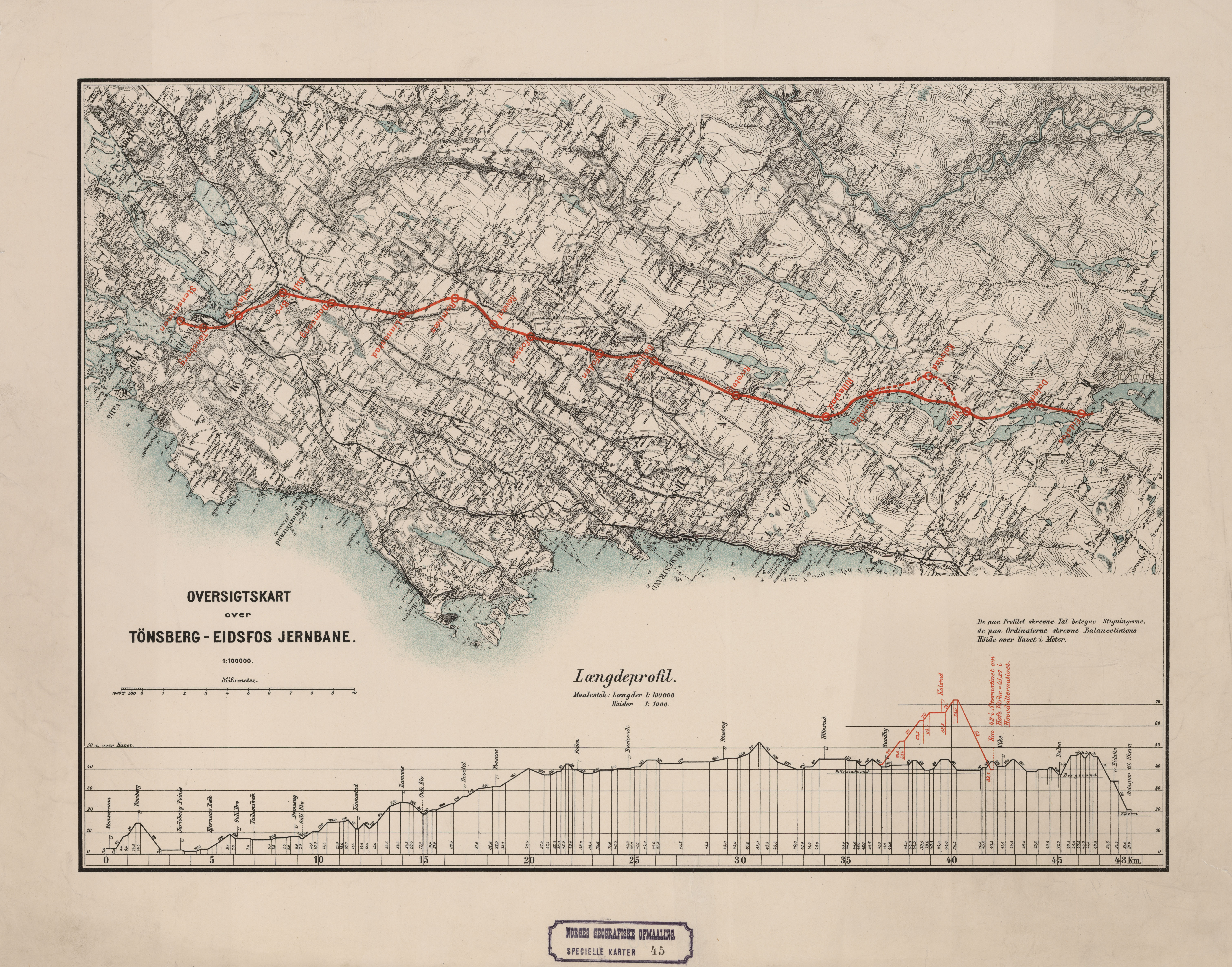 Specielle Karter 45 Trasé for Tønsberg-Eidsfossbanen 1903.